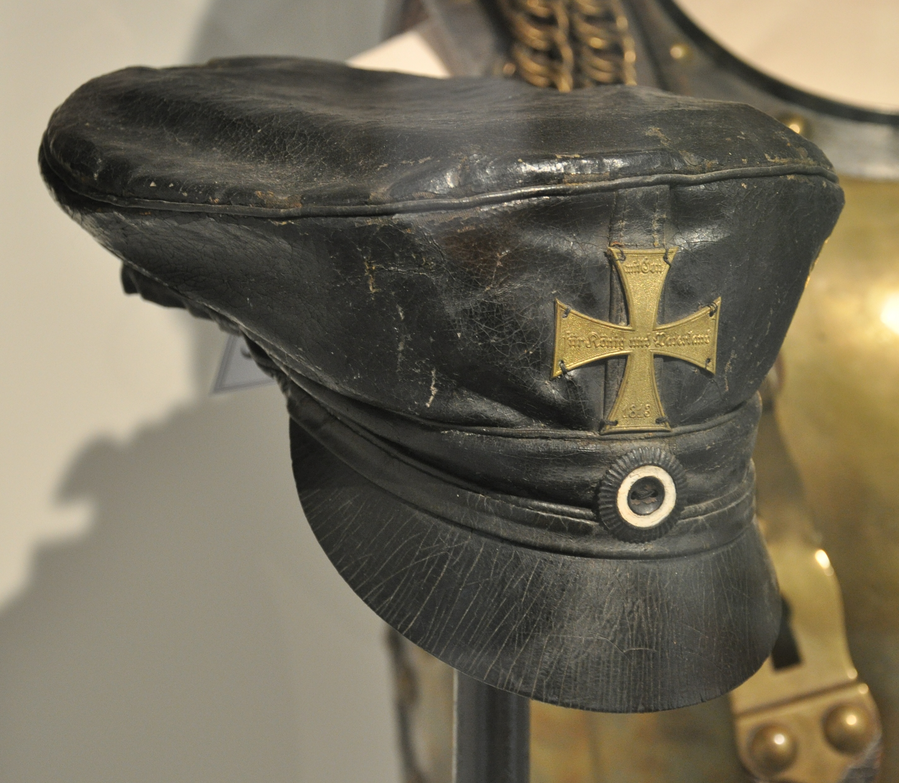 Museum Senftenberg (im Schloss Senftenberg) Landwehrmütze, Preußen, 1. Hälfte 19. Jahrhundert